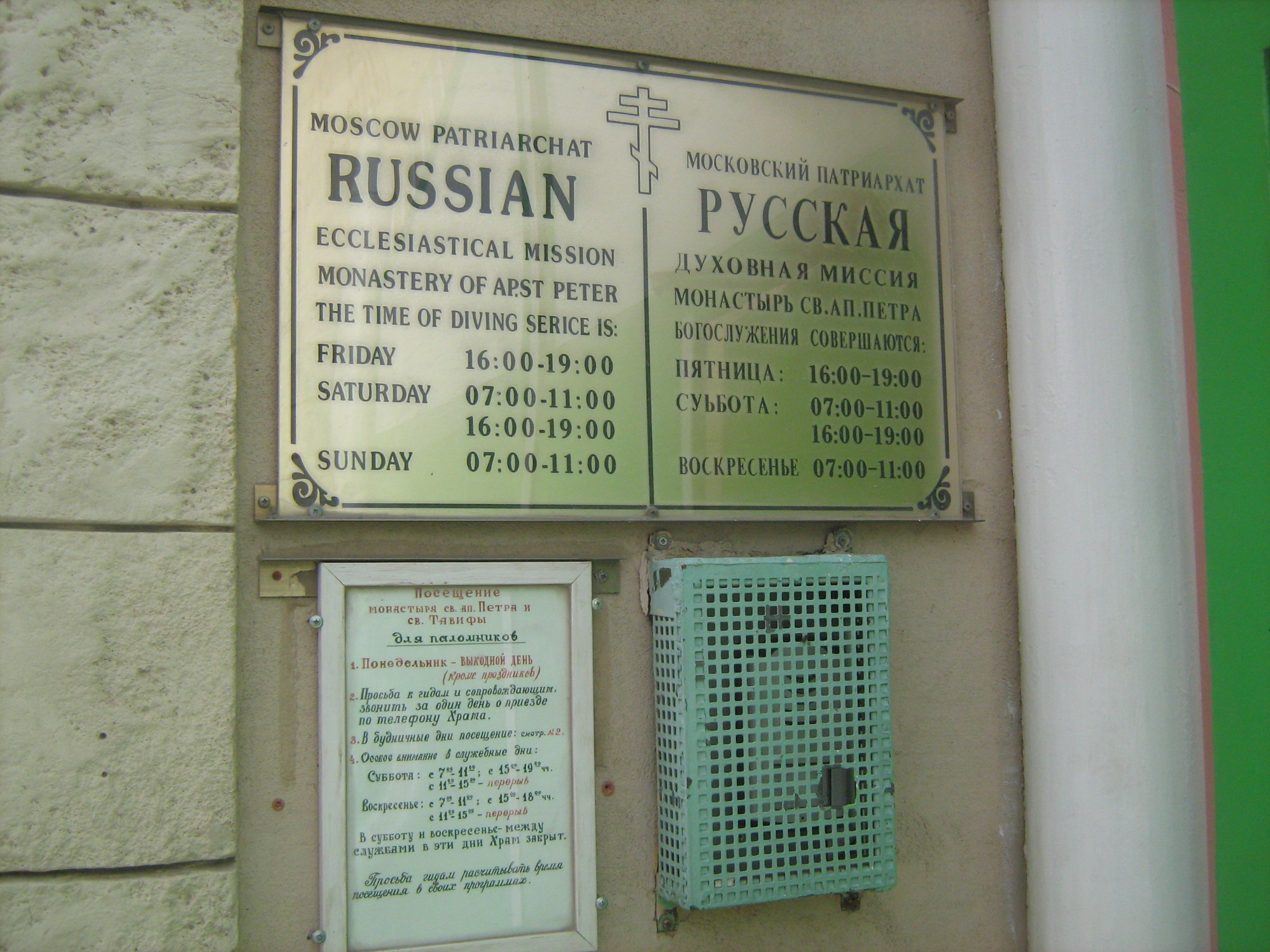 הכנסייה הפרבוסלבית אבו כביר